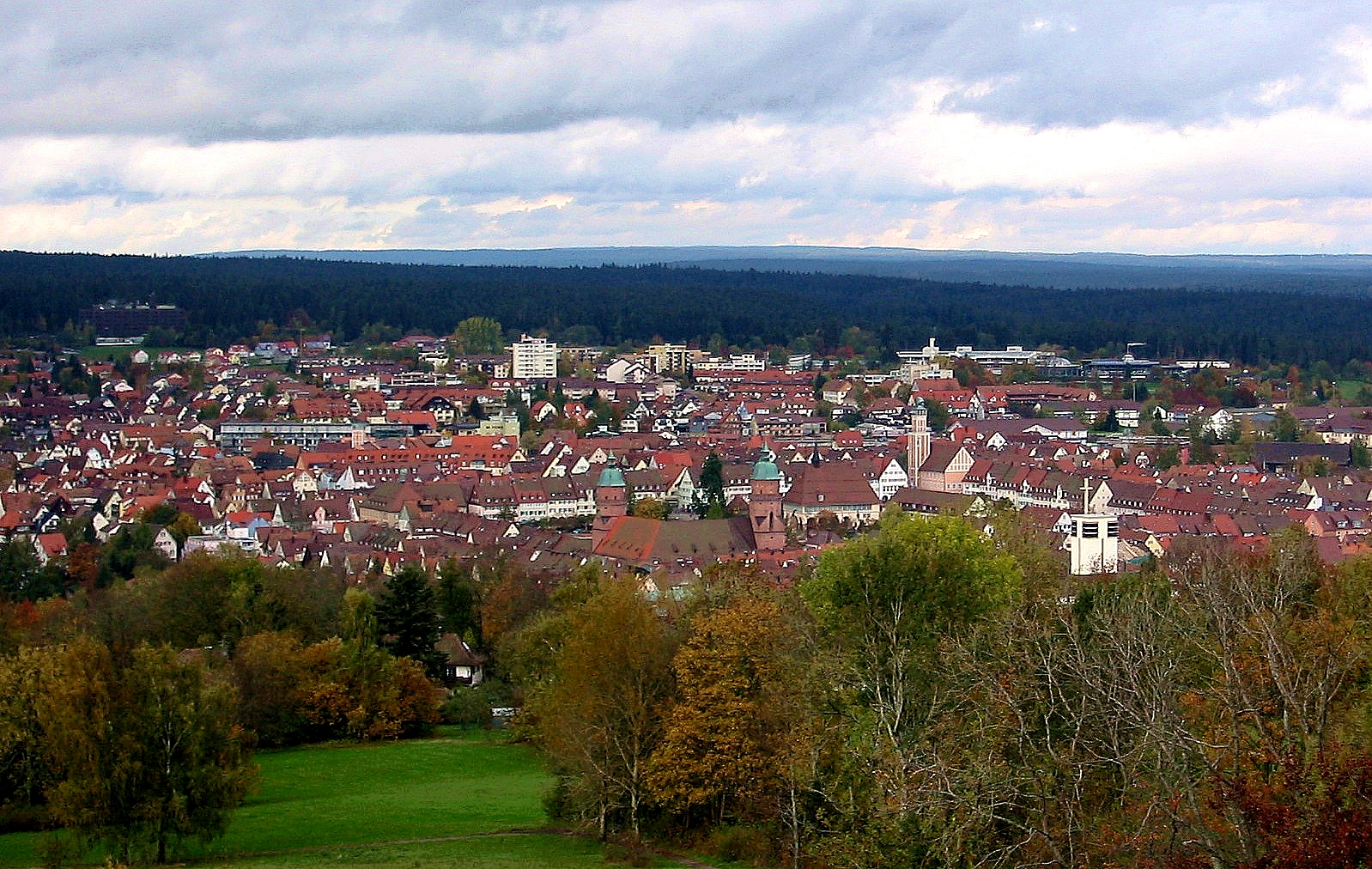 Freudenstadt im Schwarzwald. Blick vom etwas außerhalb gelegenen Friedrichsturm. Zu sehen sind die Türme der Kirche am Marktplatz sowie der Turm des Rathauses